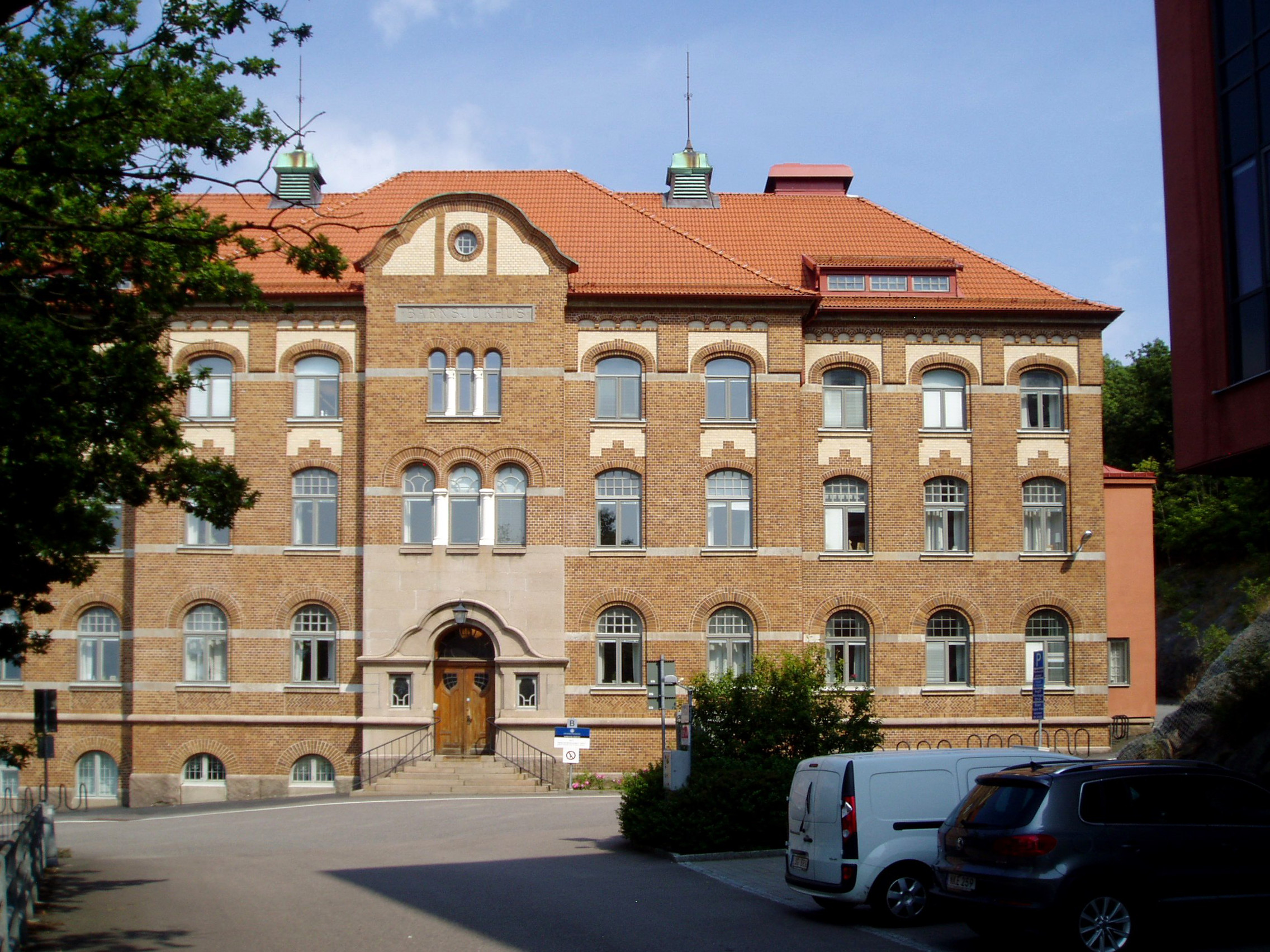 Tredje barnsjukhuset i Göteborg, bredvid Annedalskyrkan, fasad mot Per Dubbsgatan.